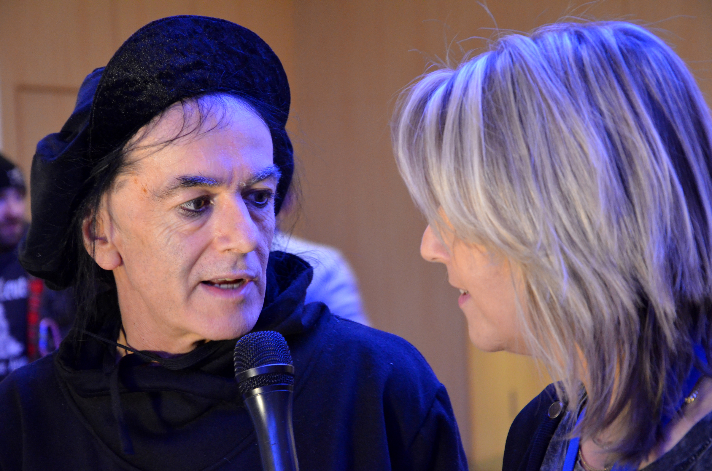 der Journalist, Radiomoderator, Sänger und Autor Ecki Stieg wird hier 2013 auf dem Fest Die!!! Weihnachtsfeier für Obdachlose und Bedürftige in Hannover nun selber interviewt ...